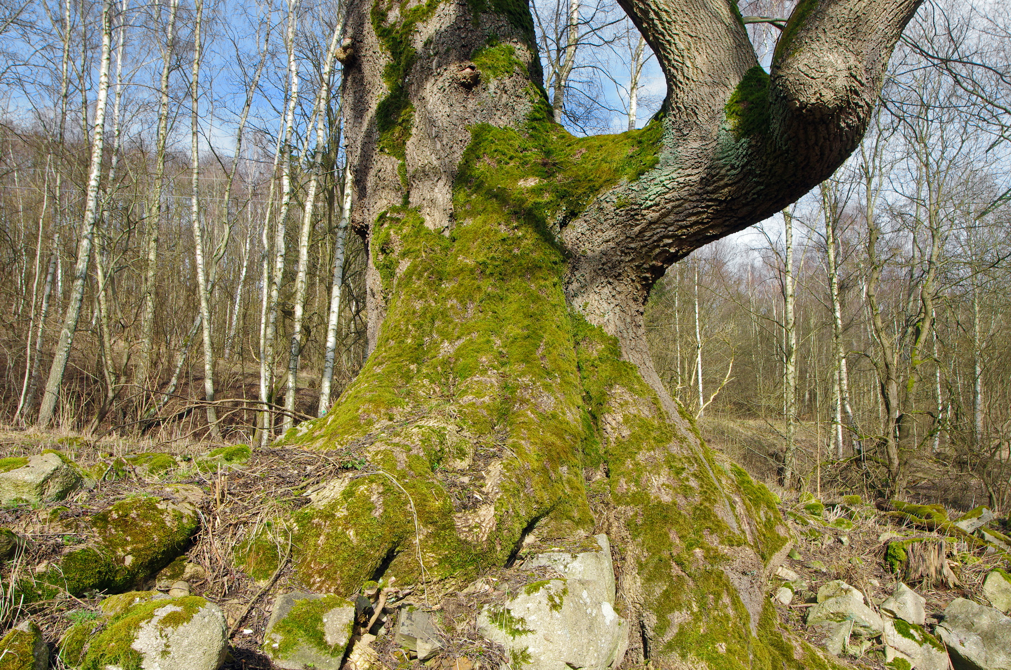 památný strom Popovský jasan, okres Karlovy Vary